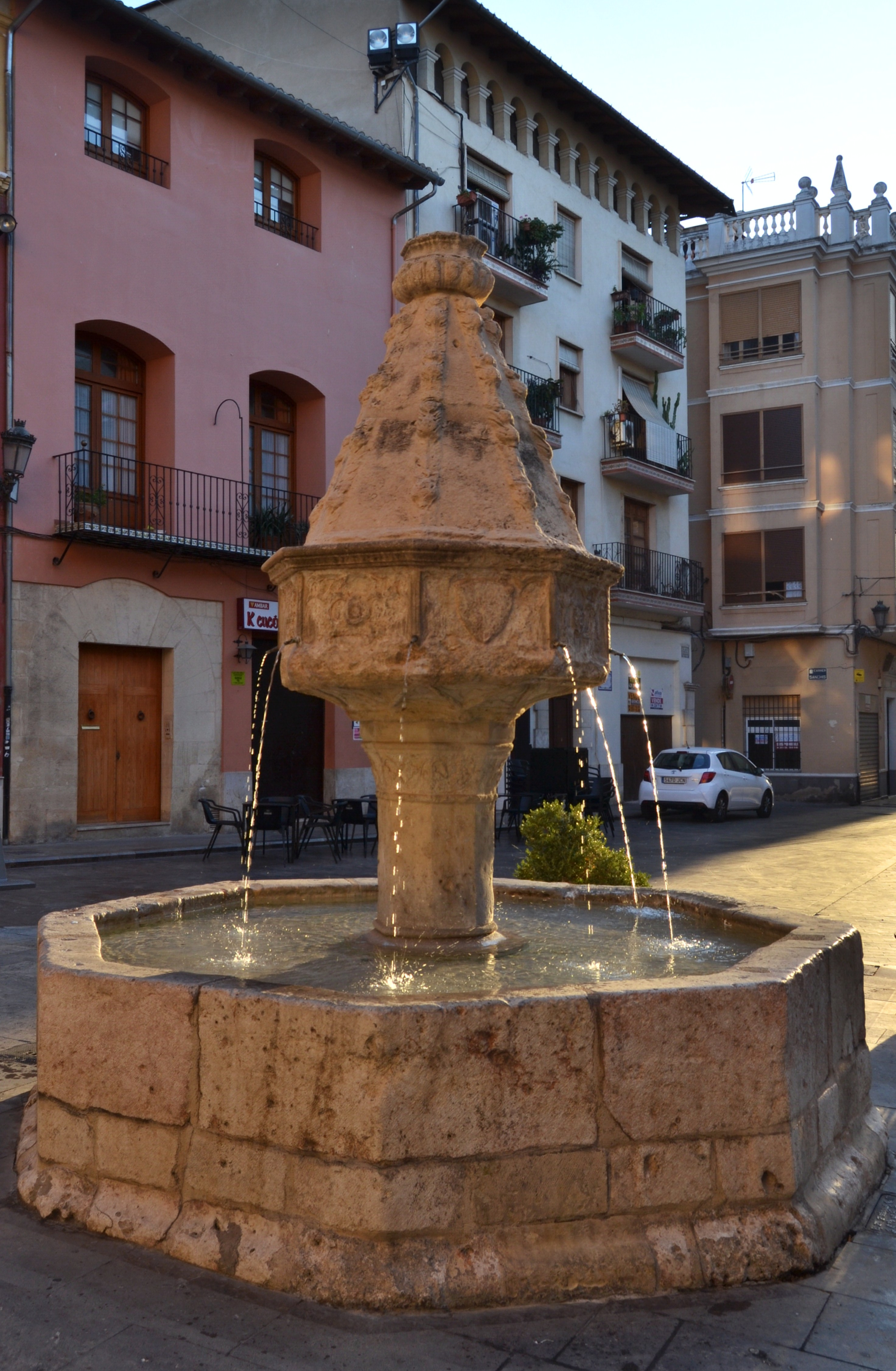 Font gòtica de la Trinitat de Xàtiva.